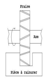 Dessin personnel d'une fraise 3 tailles